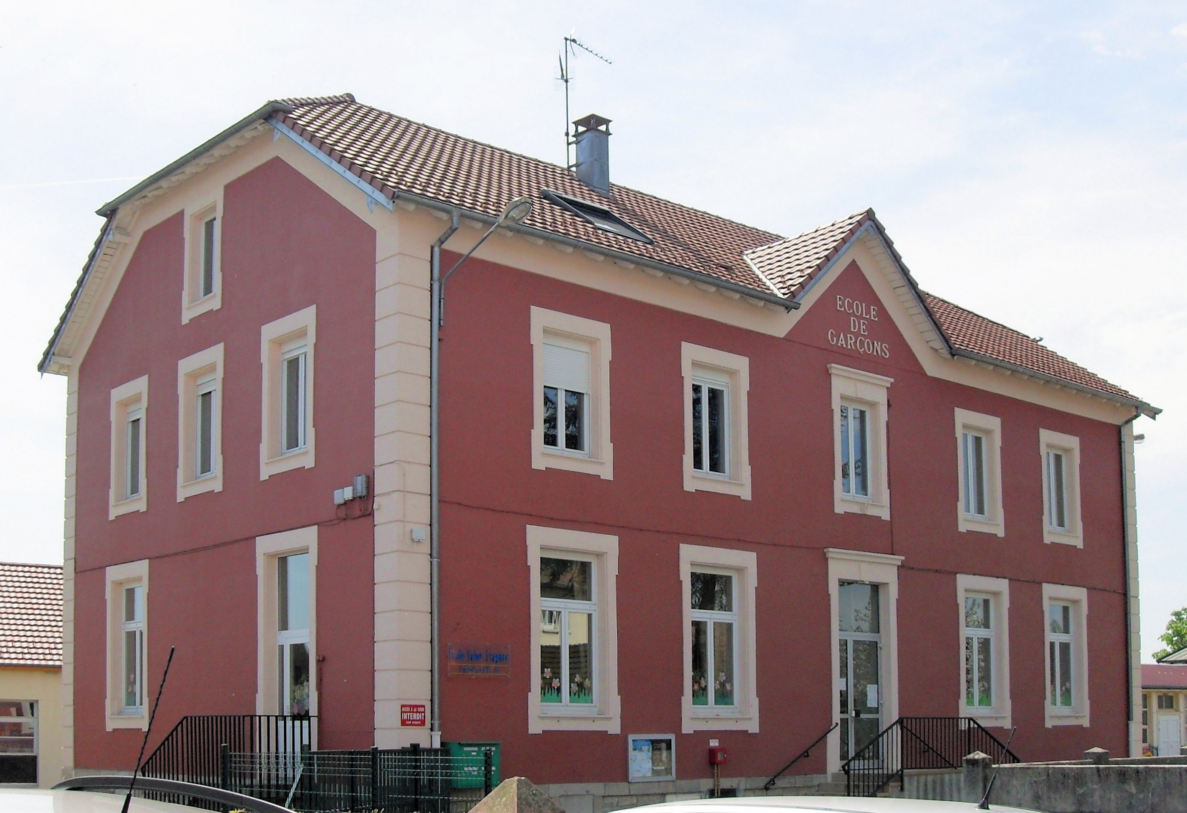 L'école élémentaire Saint Exupéry de Danjoutin